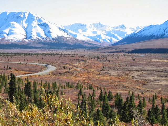 Deitsch: Denali Nationalpark